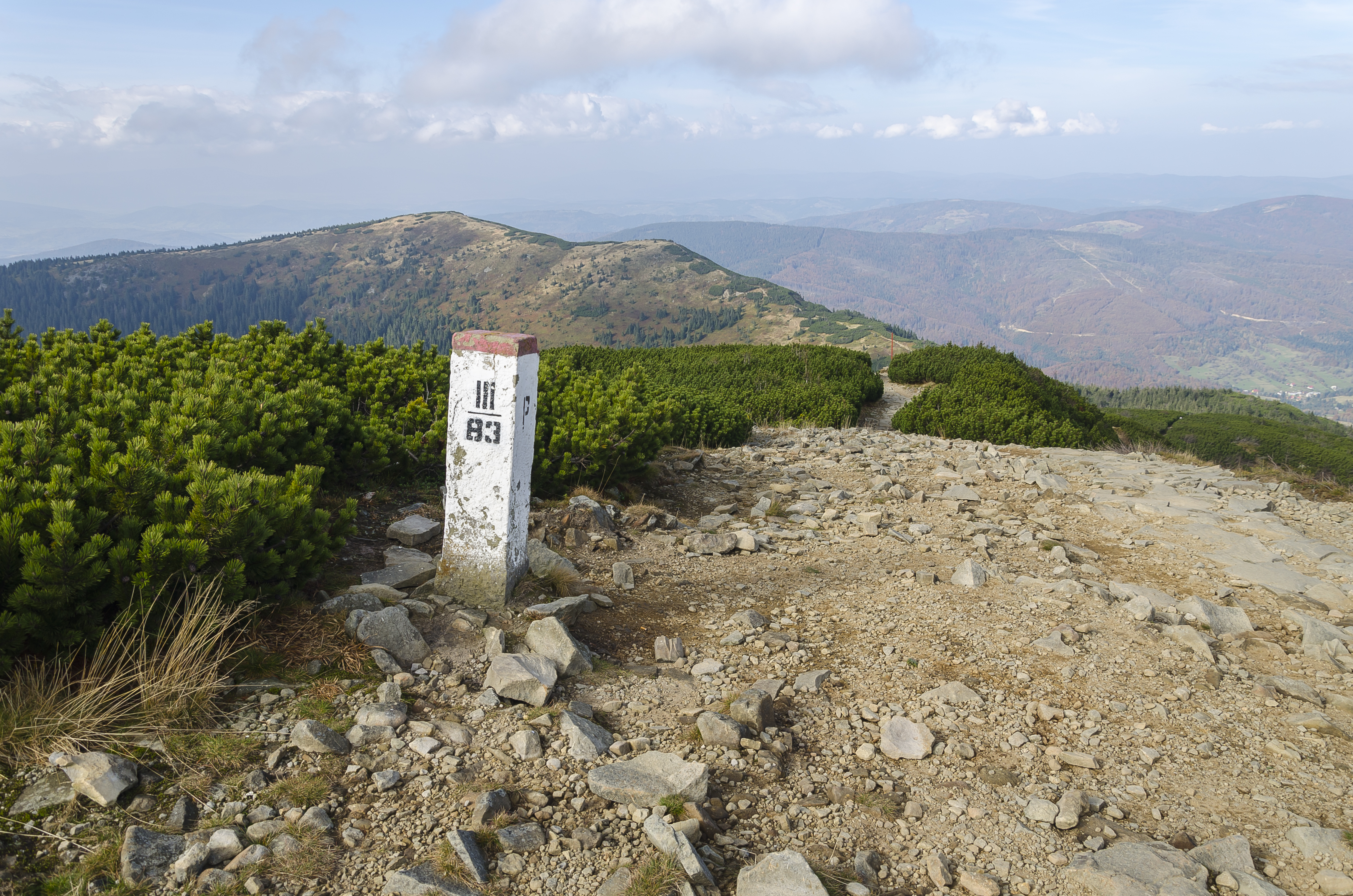 Gmina Zawoja, Poland